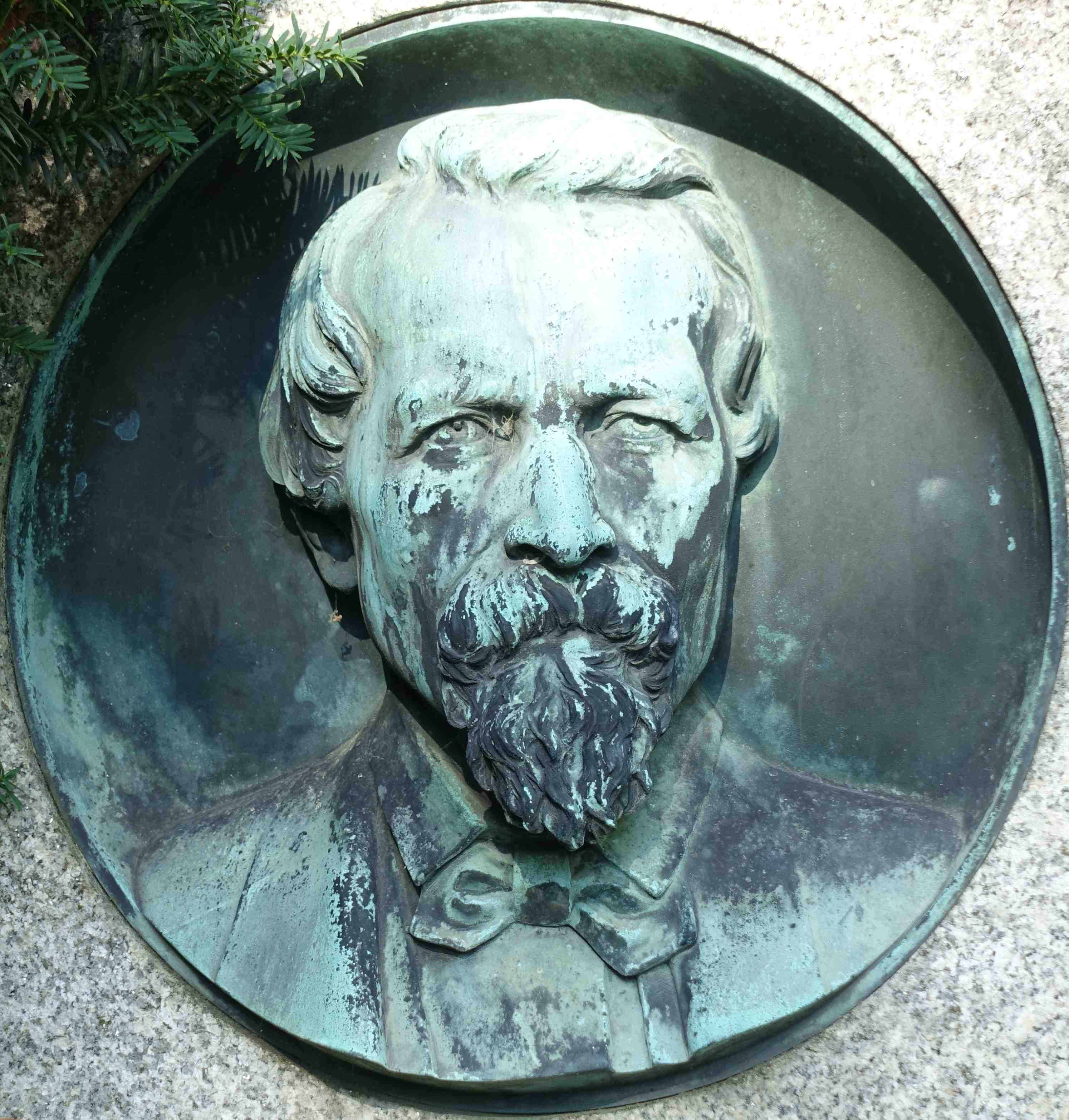 Bronzerelief von Georg von Morlok von seinem Grab in Abteilung 4 auf dem Pragfriedhof in Stuttgart, 1896.